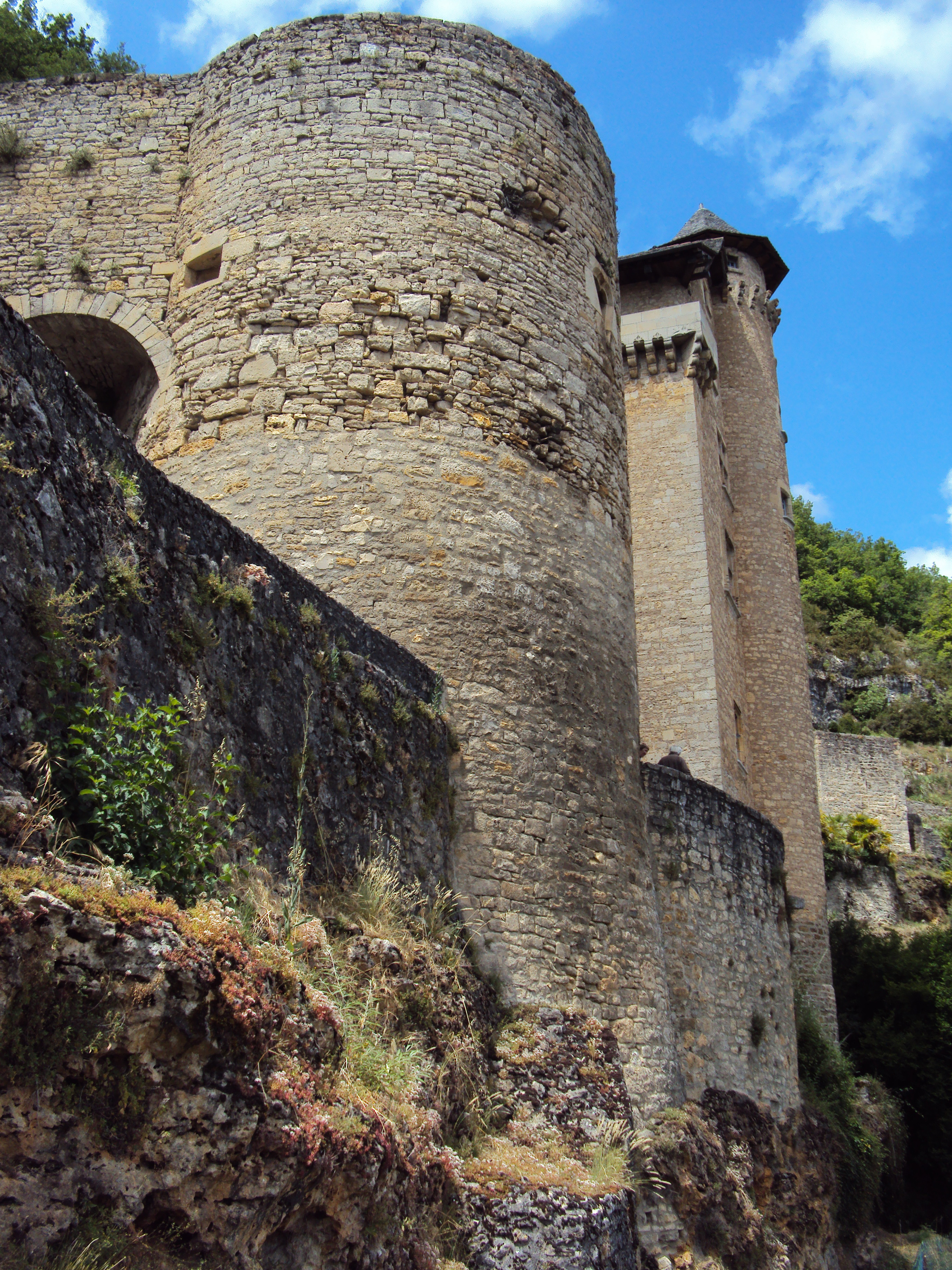 Le château médiéval de Larroque-Toirac - Département du Lot (46) - France - Juin 2011 - Photo 04 Ænglisc: The medieval castle of Larroque-Toirac in the Lot department (46) - France - June 2011 - Photo 04